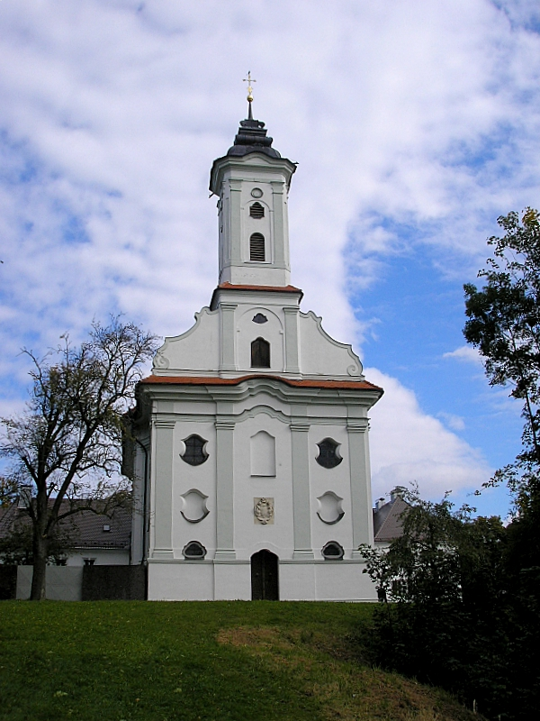 Votivkirche St. Thekla (Welden, Landkreis Augsburg, Bayerisch-Schwaben). Die Westfassade. Eigene Aufnahme, Sept. 2007 / St. Thekla (Welden near Augsburg, Bavaria, Germany). The western facade. Own photo, Sept. 2007